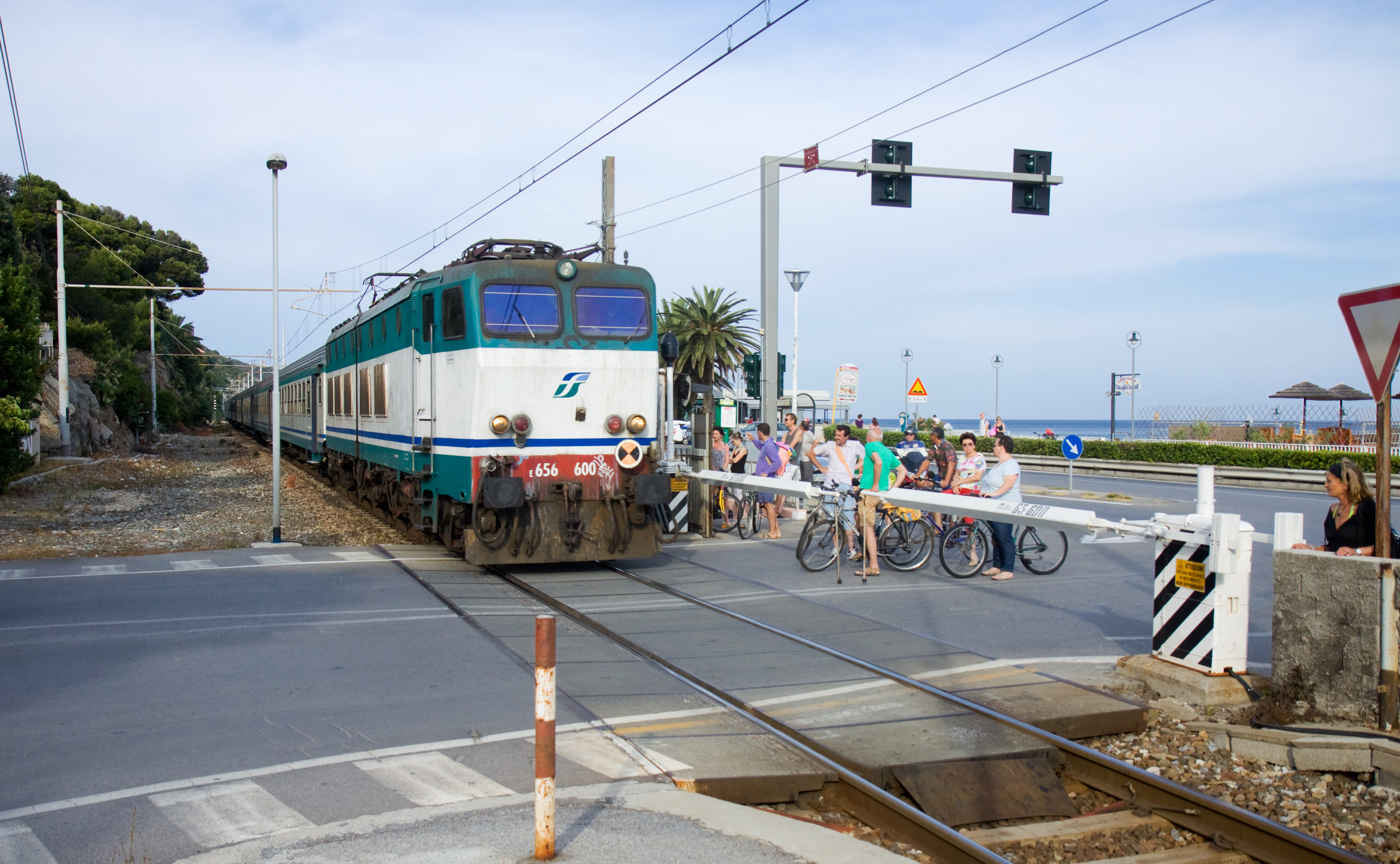 Treno presso un passaggio a livello a Borgio Verezzi